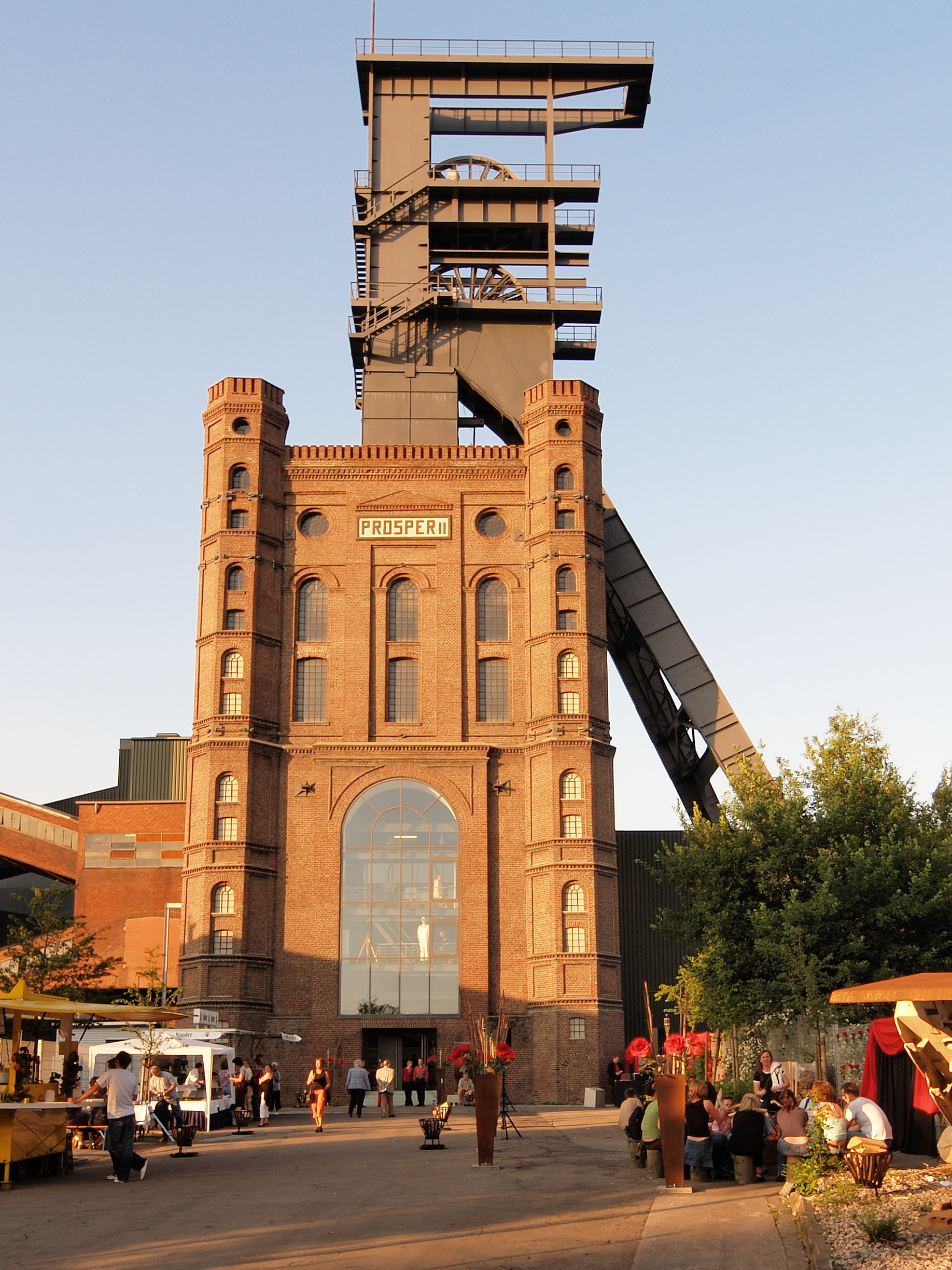 Malakow-Turm der Zeche Prosper Haniel in Bottrop, Schacht Prosper 2. Aufnahme bei der Extraschicht 2006